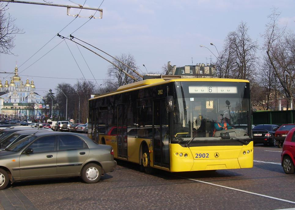 Троллейбус ЛАЗ-E183 на Софиевской площади в Киеве.